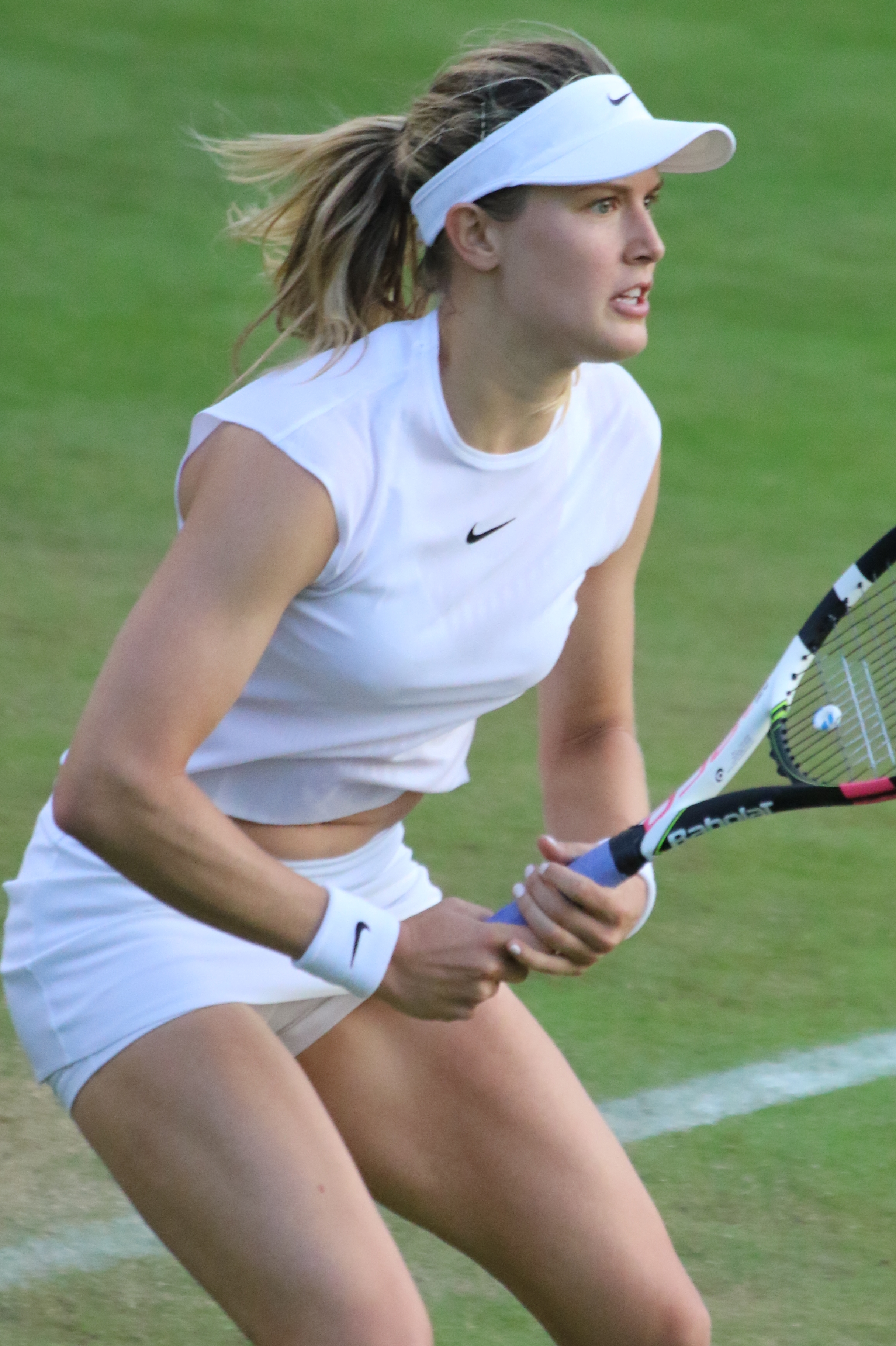 Bouchard WM17 (18)